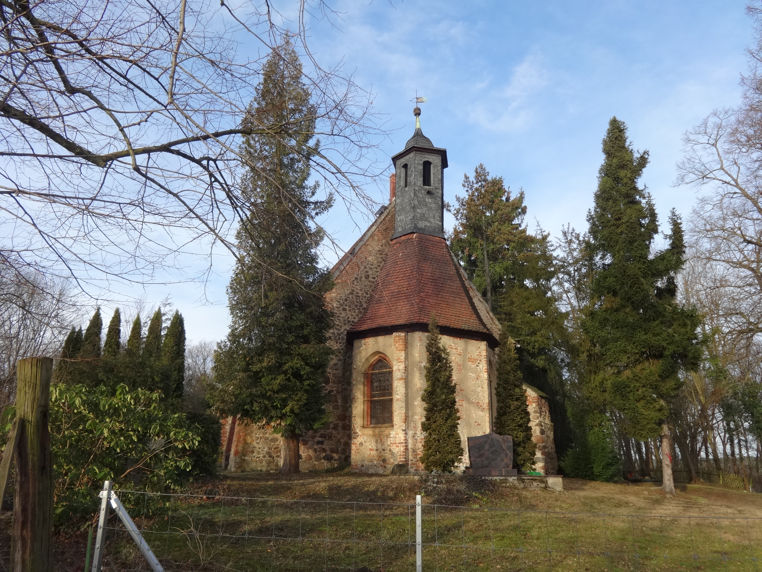 Die Sankt-Briccius-Kirche ist eine denkmalgeschützte Saalkirche aus dem 12. Jahrhundert in Bad Belzig im Landkreis Potsdam-Mittelmark in Brandenburg. Sie ist dem heiligen Brictius von Tours geweiht. Im Innern befinden sich ein Altaraufsatz sowie eine Kanzel aus dem 17. Jahrhundert. Auffällig ist, dass der Turm sich über dem Altarraum im Osten und nicht wie üblich im Westen befindet.